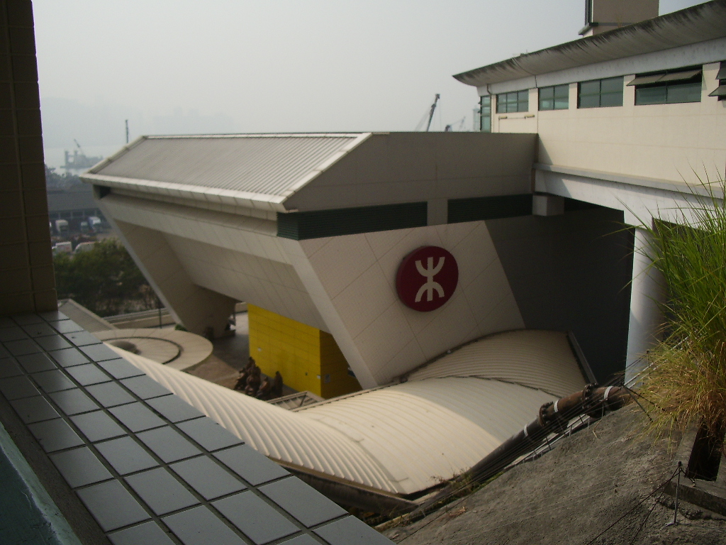 Yau Tong Station